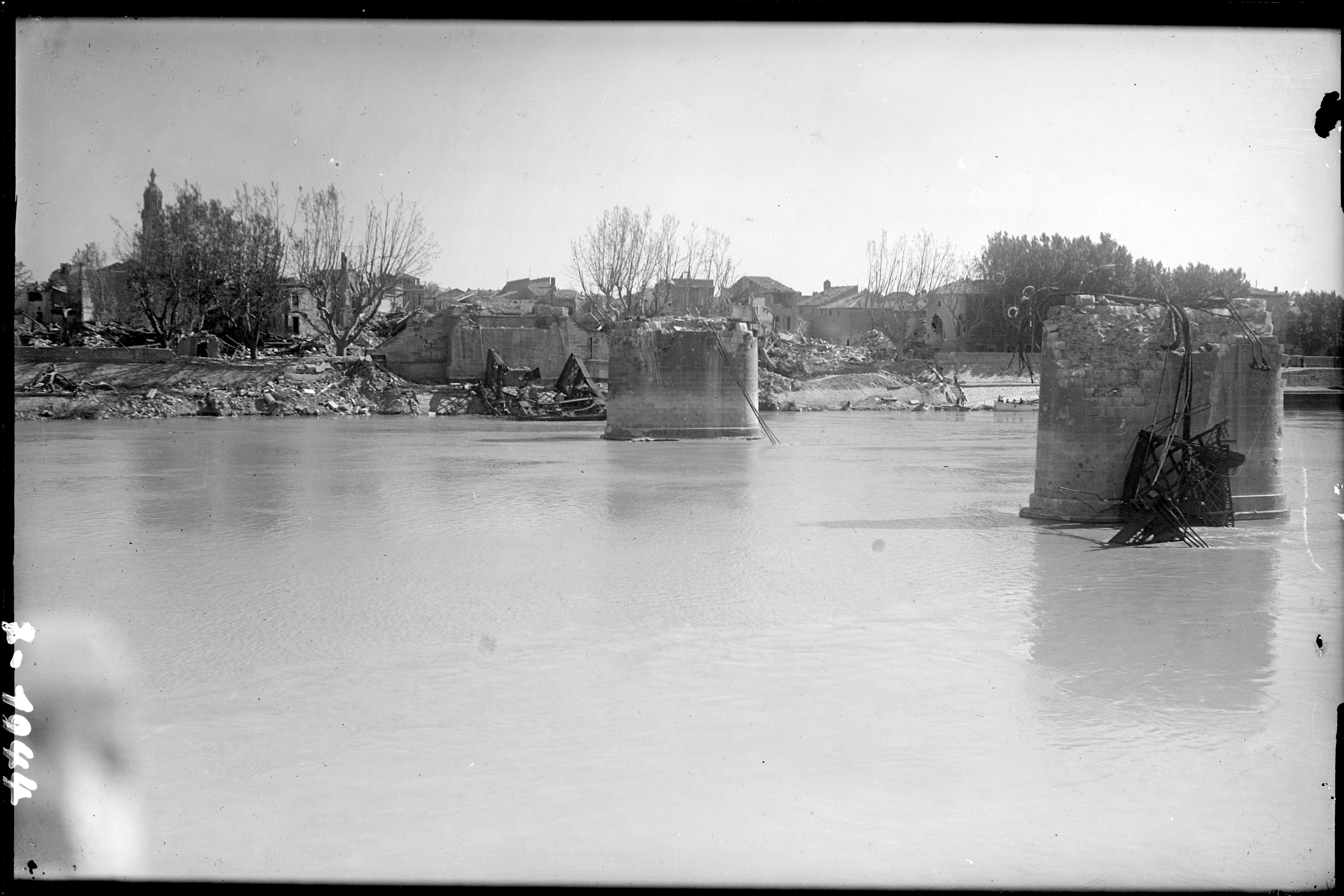 Ruines du Pont de Trinquetaille